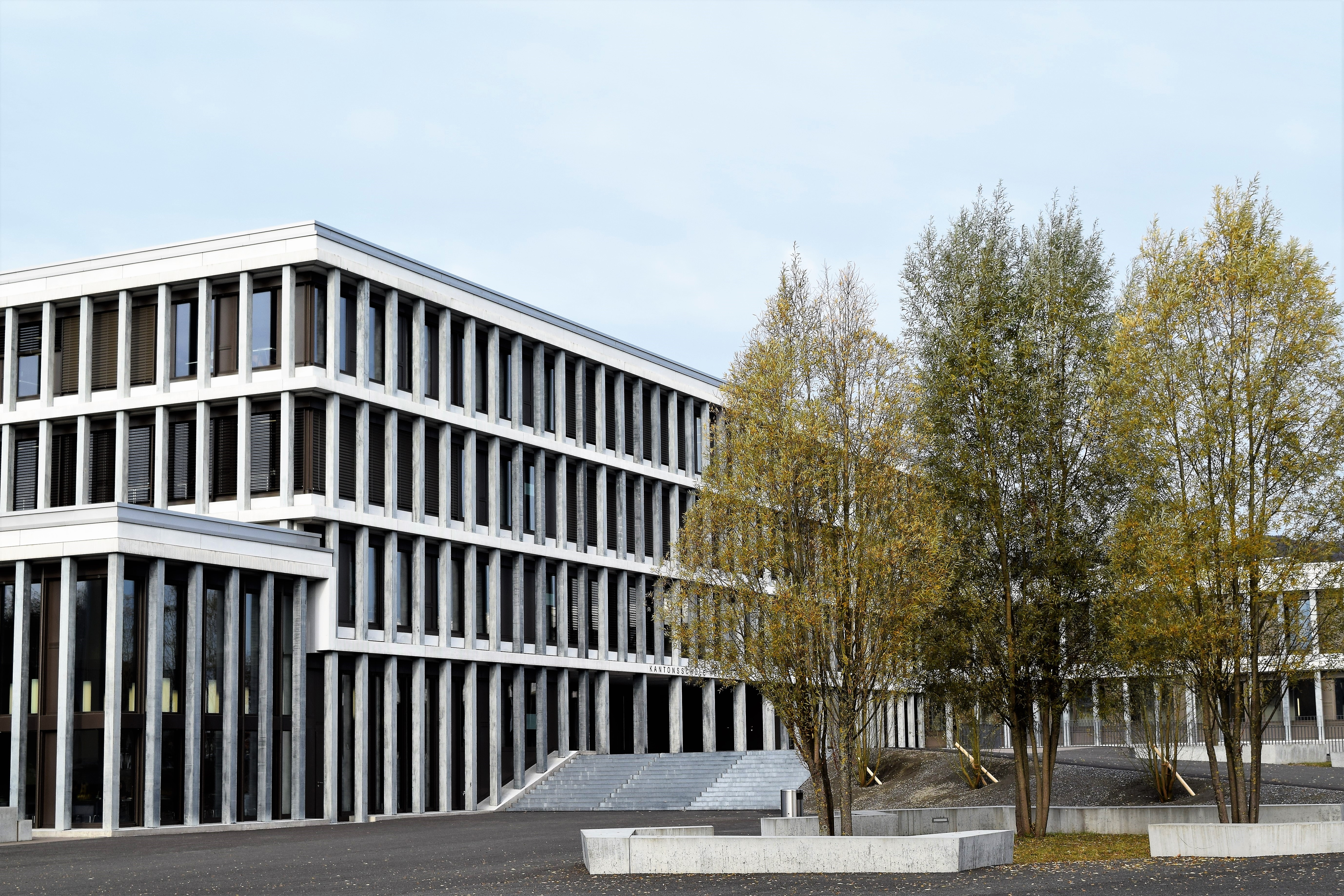 Ostseite mit Eingang zur den Sporthallen